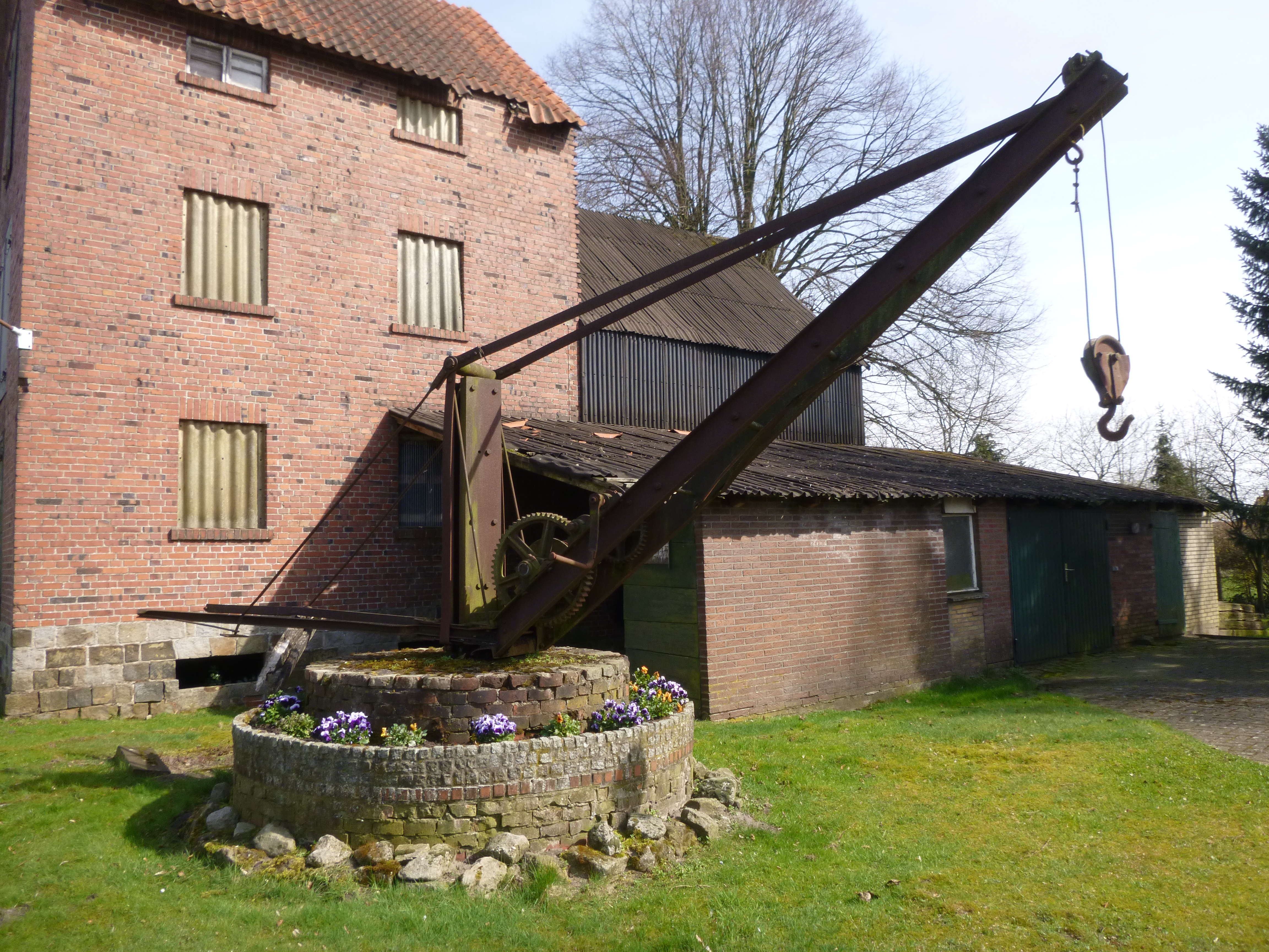 historia puto "Dörper Pütt" en Andervenne, Malsupra Saksio, Germanio